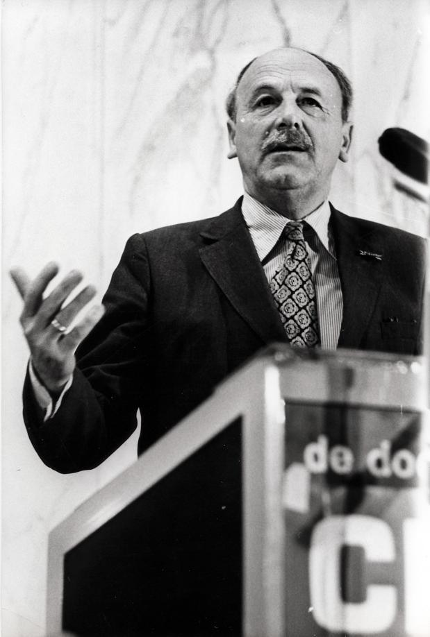 Schakel, M.W. (ARP). ARP-partijraad in Rotterdam: de nieuwe CDA-vice fractievoorzitter Schakel aan het woord. Nederland, Rotterdam, 10 december 1978.